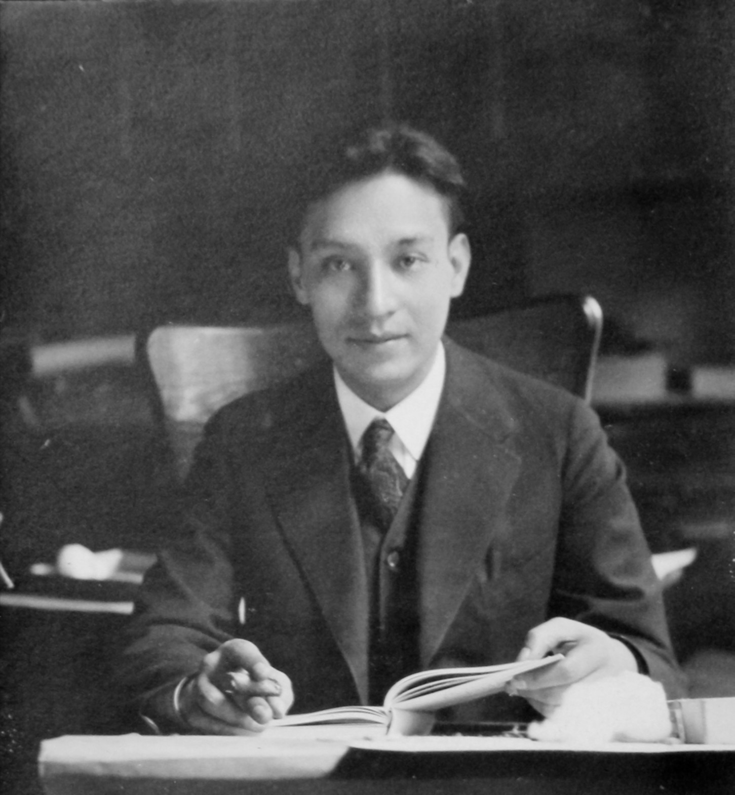 portrait, Aurelio Escobar Castellanos, fotographer